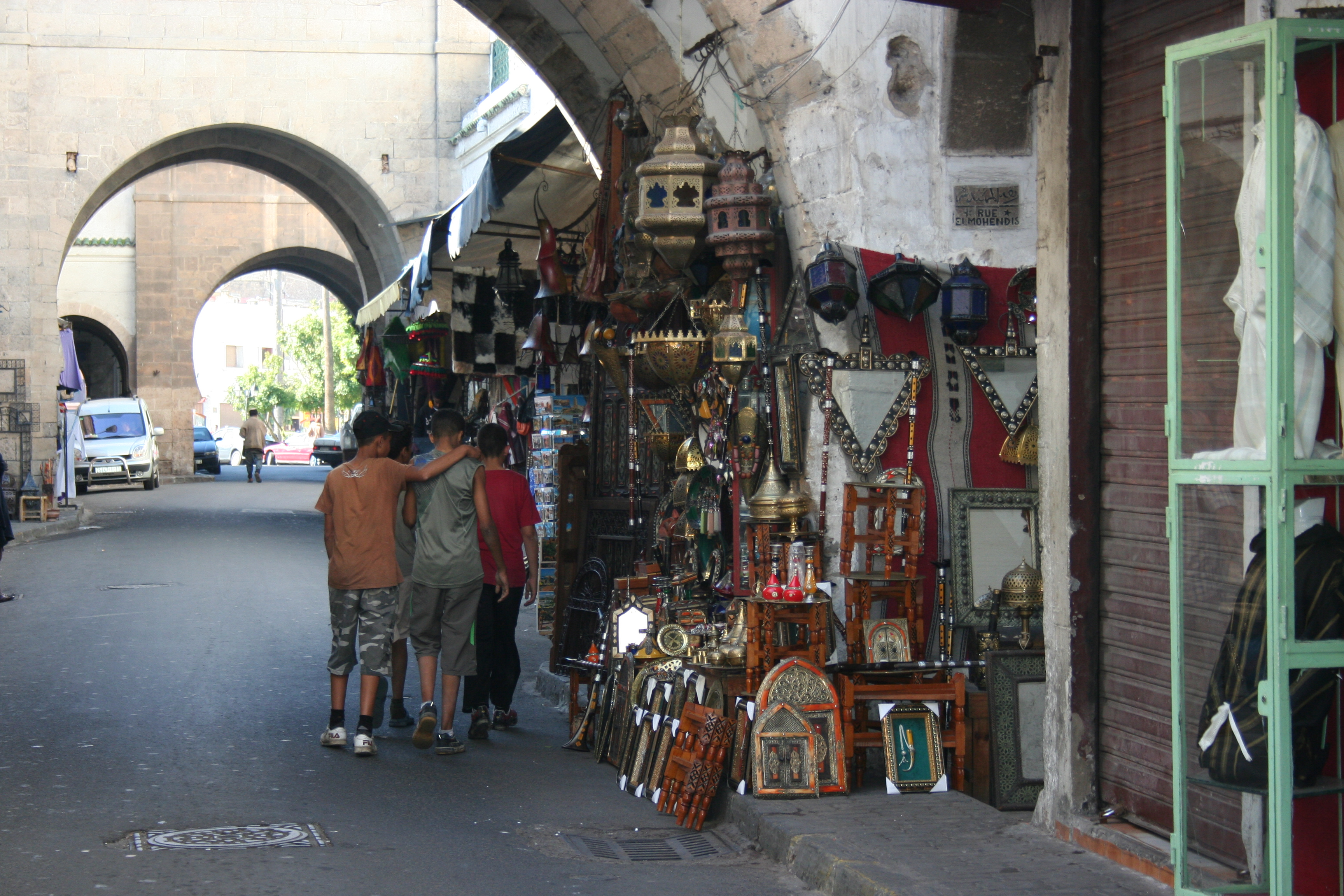 Habous es conocido por sus bazares, en donde podremos comprar artesanía de muy buena calidad, como babuchas, alfombras, cachimbas o muebles y conseguirla a un buen precio si sabemos regatear.